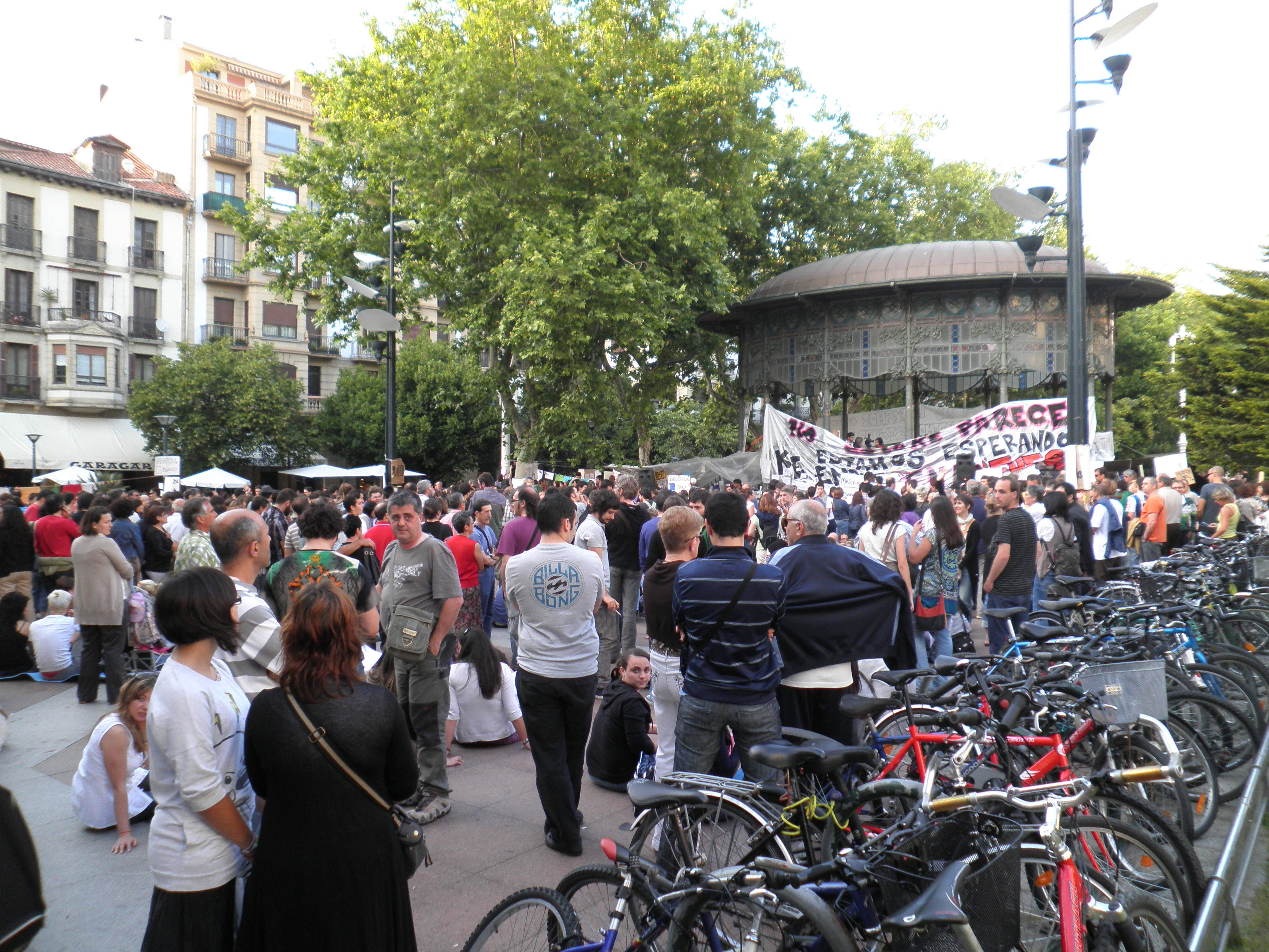 Donostiako akanpada, asanblada